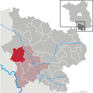 Falkenberg/Elster in Brandenburg (Country) - District Elbe-Elster